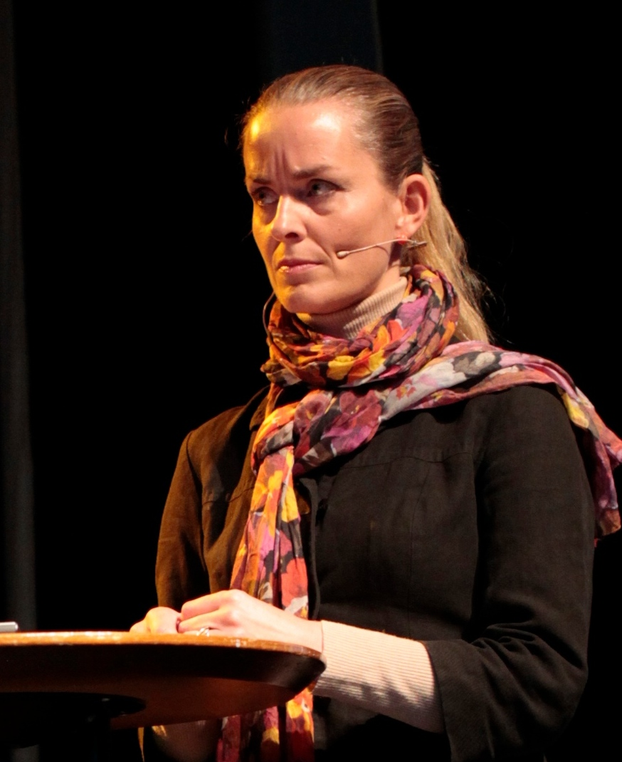 Katrine Sunde/ Norges Kreative Fagskole/ Nordiske Mediedager